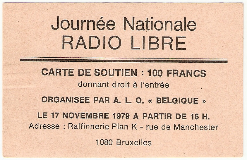 Association pour la Libération des Ondes - Belgique (ALO-B) / 17 novembre 1979 / Première journée des radios libres / Plan K / Bruxelles